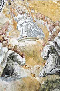 Роспісы Царквы Раства Багародзіцы ў Слаўгарадзе